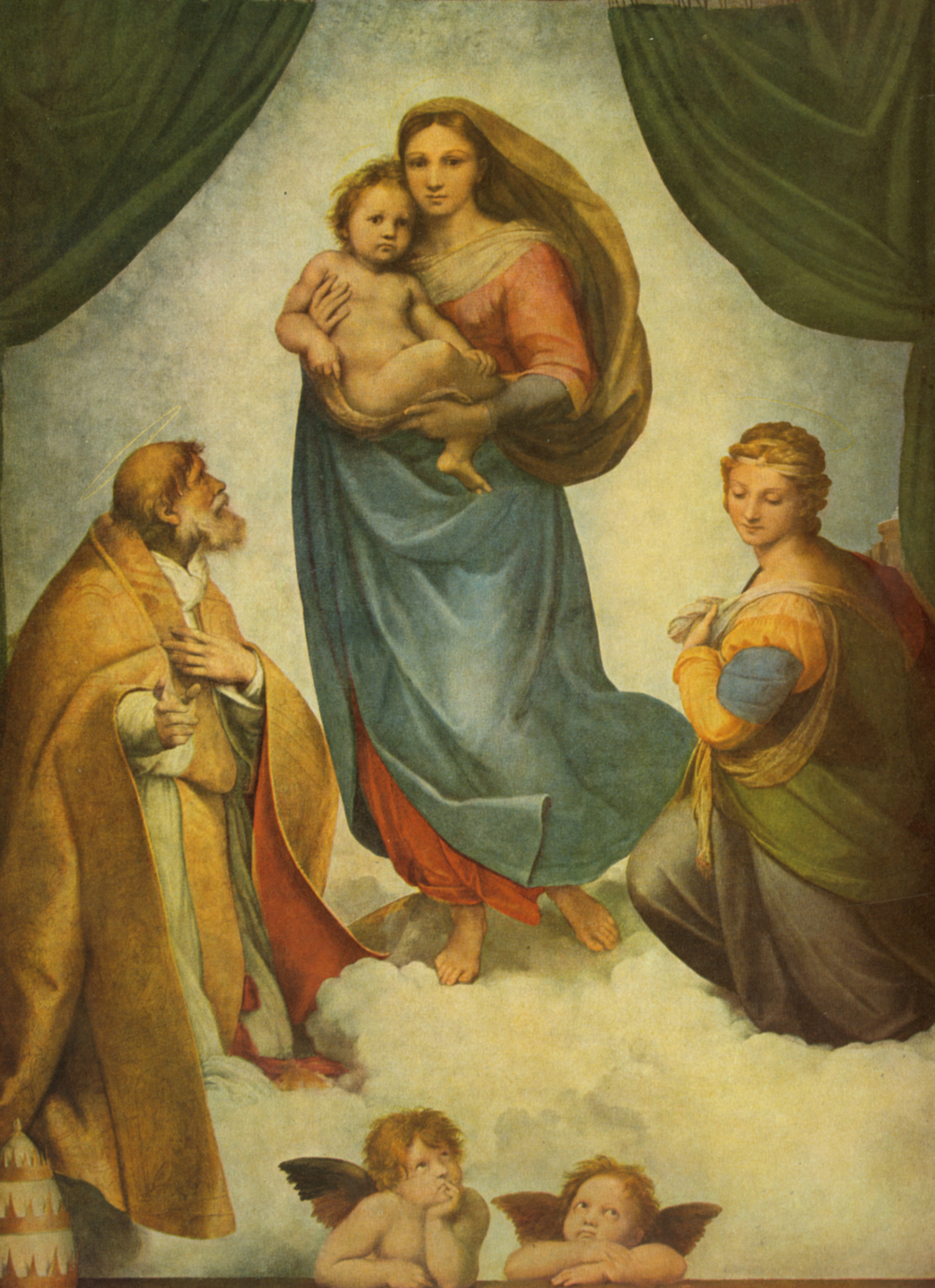 Painting by Raffaello Sanzio - Sixtinische Madonna canvas, 265 x 196 cm Dresden, Staatliche Kunstsammlungen